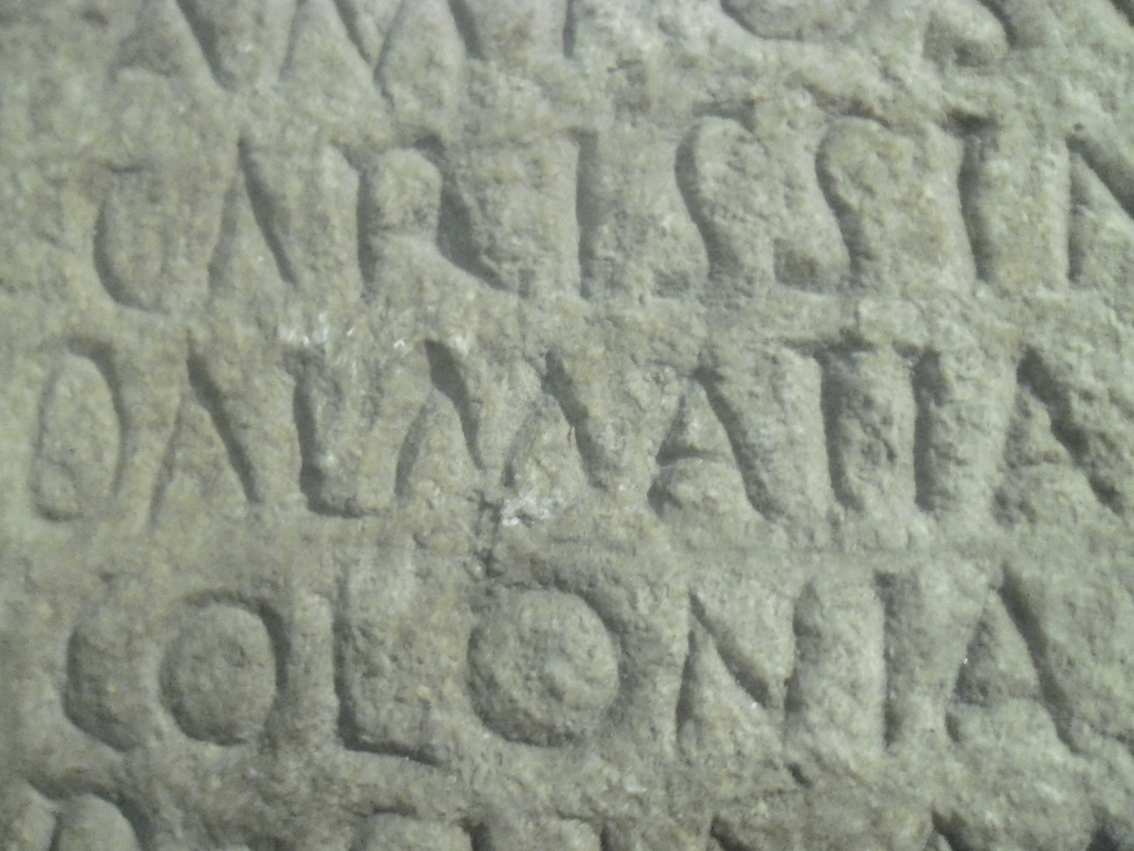 Arheološki muzej u Zagrebu